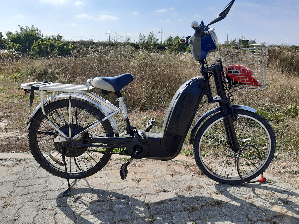 주차중인 전기 자전거